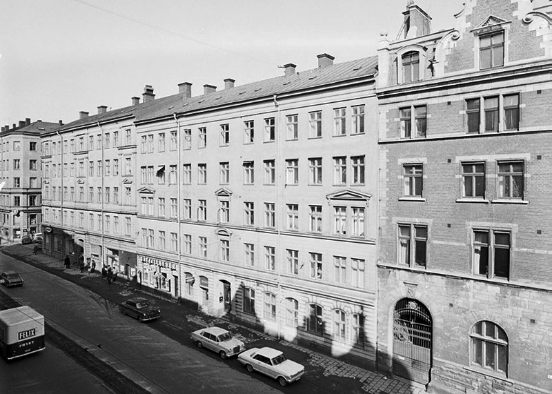 Fleminggatan 8-22 med Separatorhuset längst till vänster